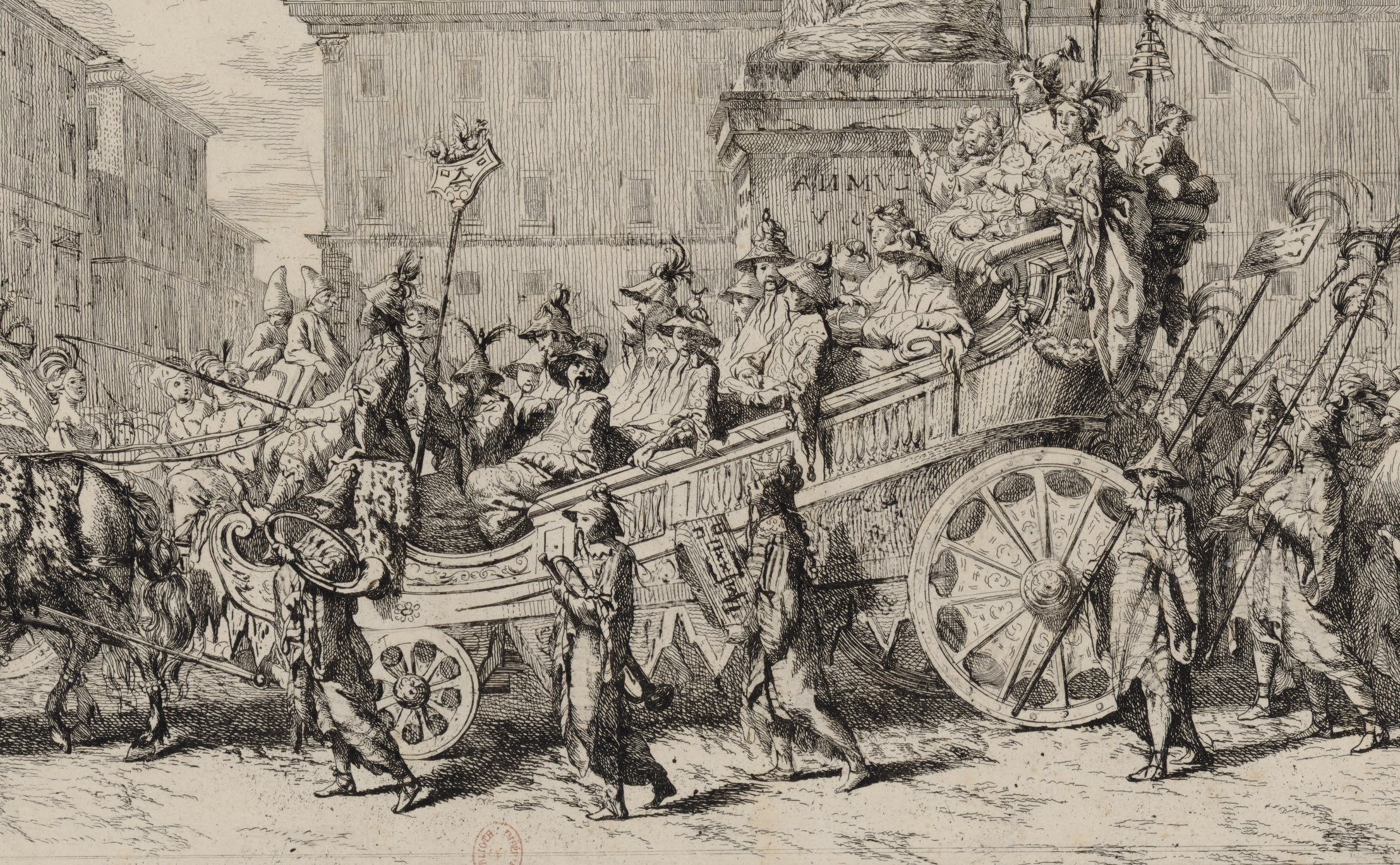 Mascarade chinoise faite à Rome le Carnaval de l'année M.DCC.XXXV par Mrs. les pensionaires du Roy de France en son Académie des Arts (détail de cette estampe)